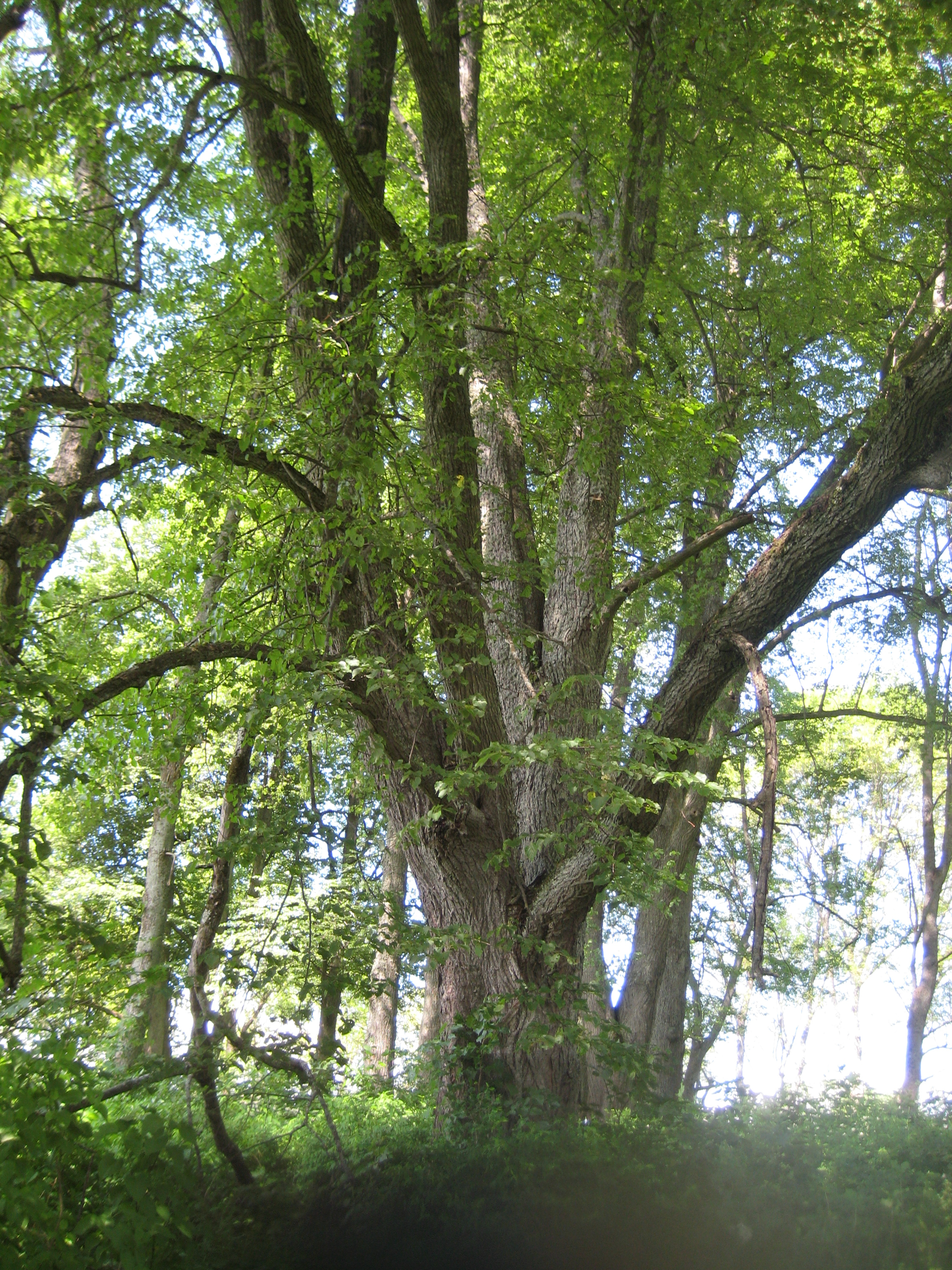 Degučių sen., Lithuania